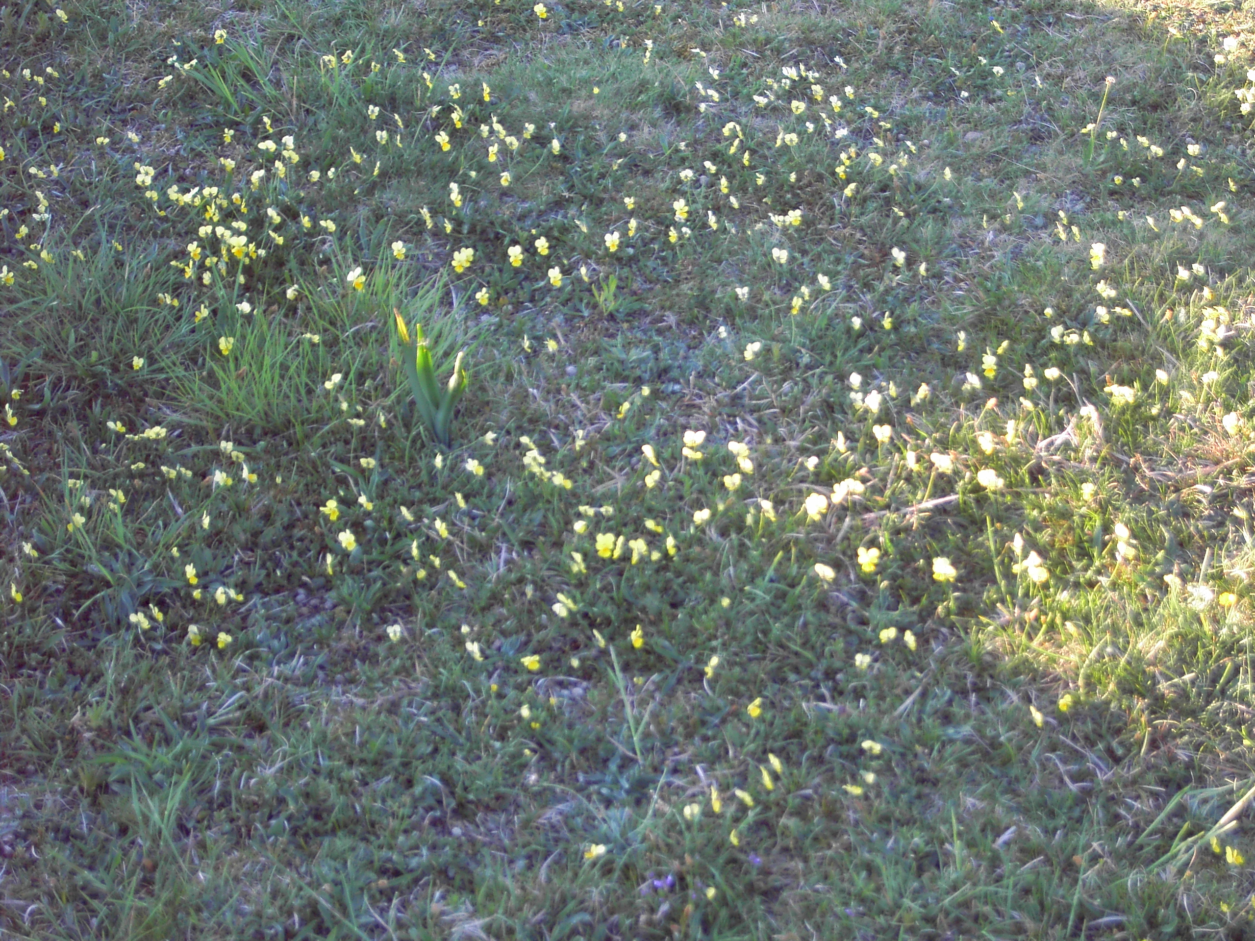 Galmeiveilchenflur im Naturschutzgebiet Brockenberg